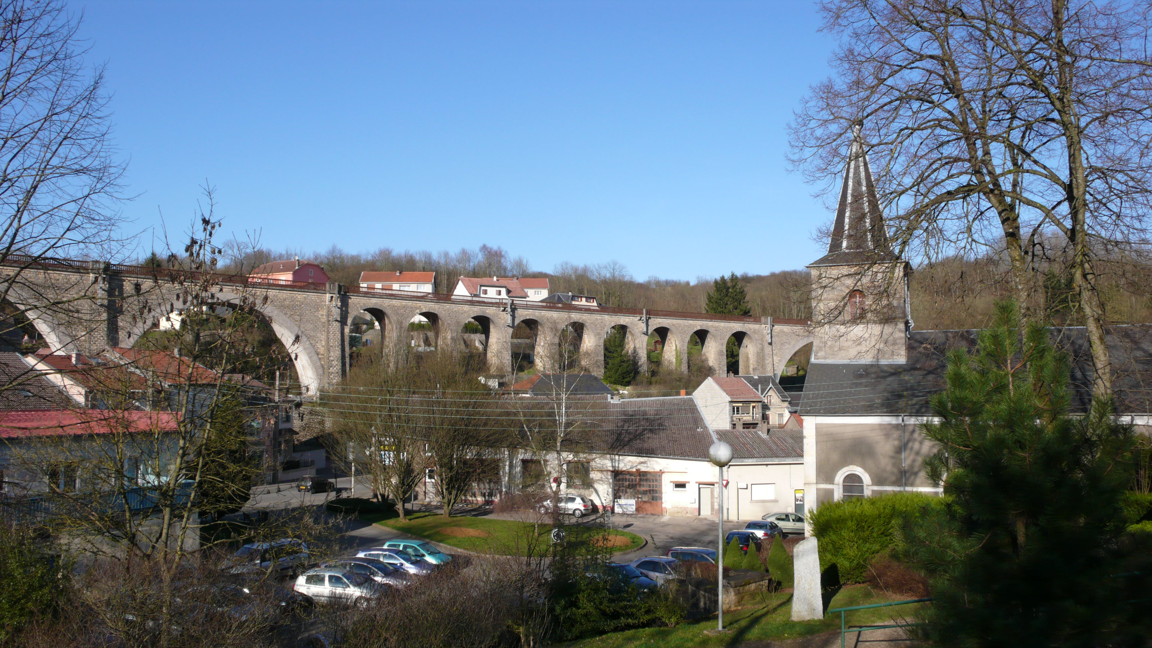 Thil